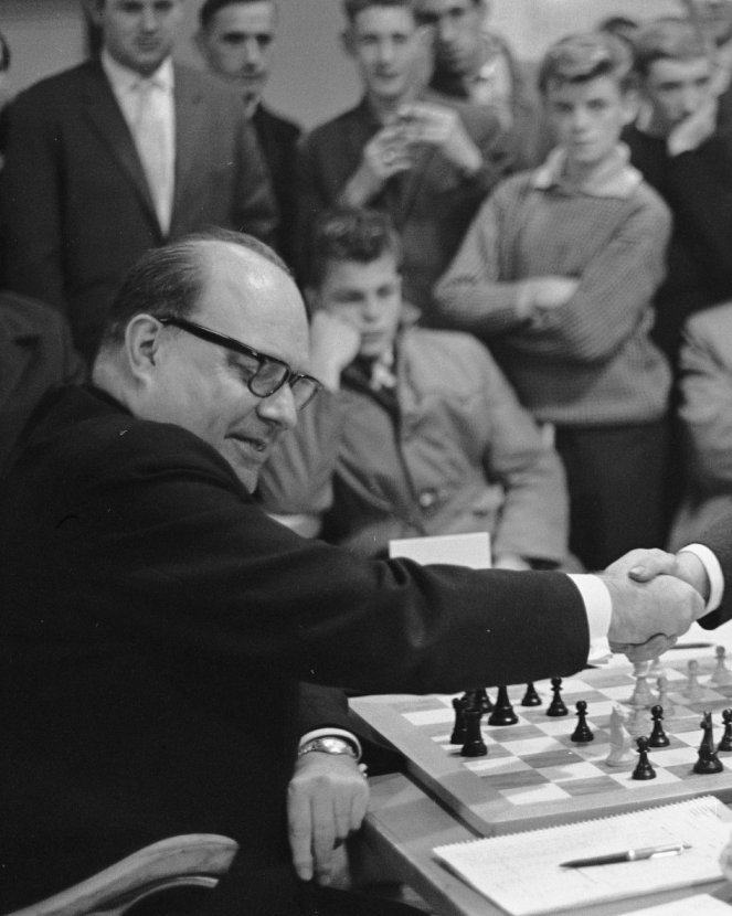 Internationaal Schaaktoernooi in Zevenaar. Stahlberg, Gelderland, Zevenaar.